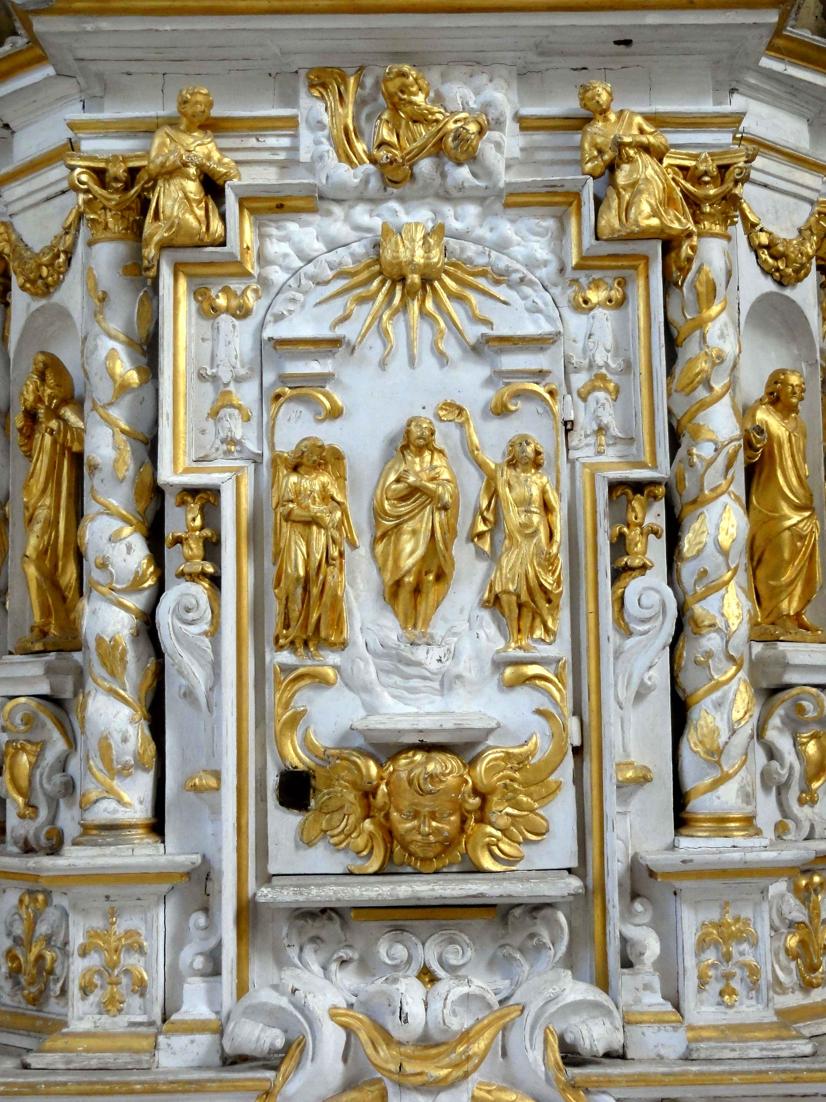 Tabernacle à ailes provenant d'Argenteuil.